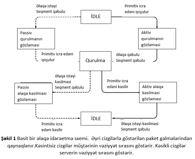 Bəsit bir əlaqə idarəetmə sxemi